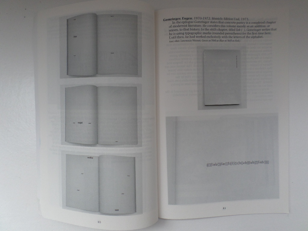 Extrait de la micro-édition " Concrete Poetry, Fluxus and conceptual Art : a Book Friction "